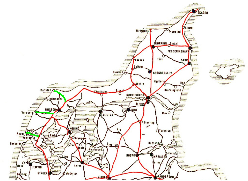 Karte über geplante Eisenbahnprojekte auf Thy - grün